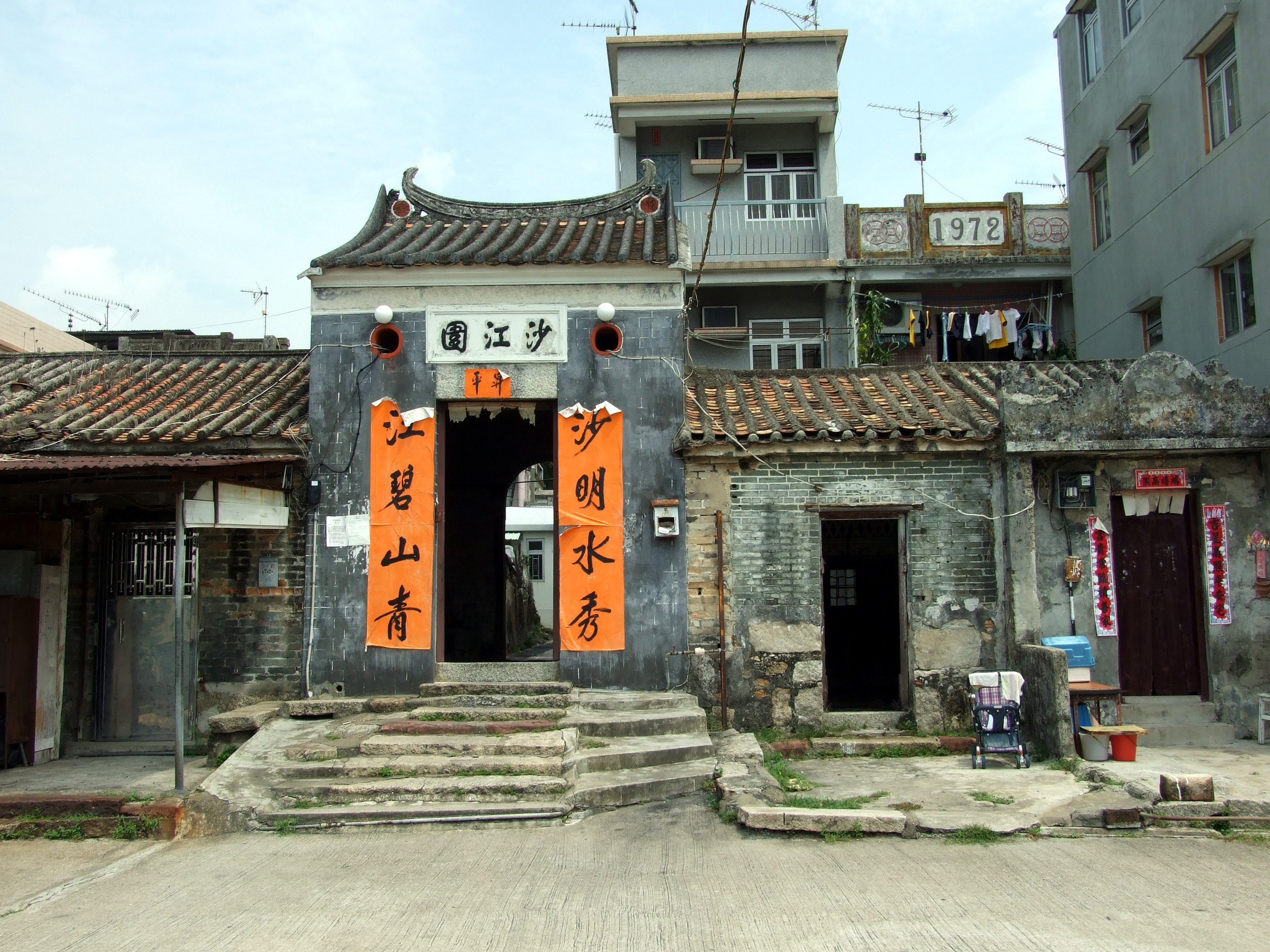 中文（香港）: 沙江圍圍門